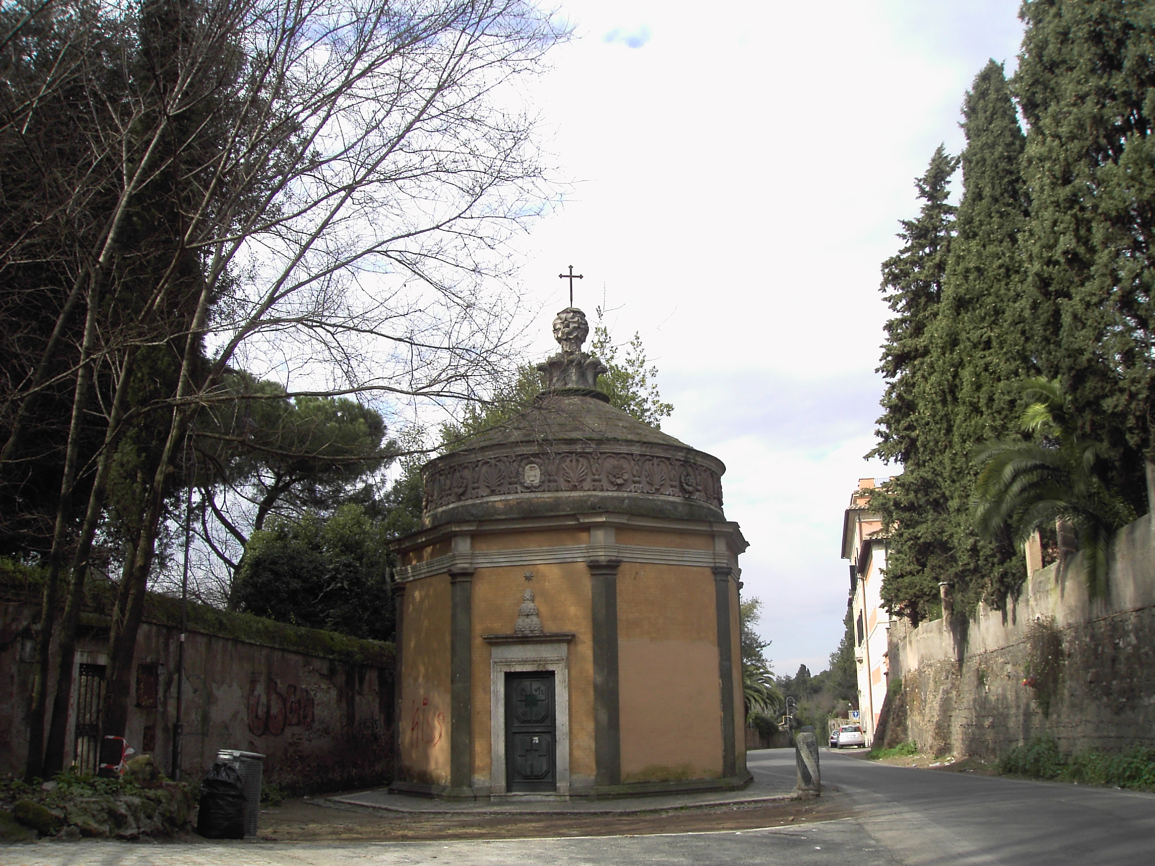 Roma, oratorio di San Giovanniin oleo a Porta Latina